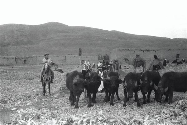 כפר בלום - הכפר הערבי בשכנות לקיבוץ נעמה